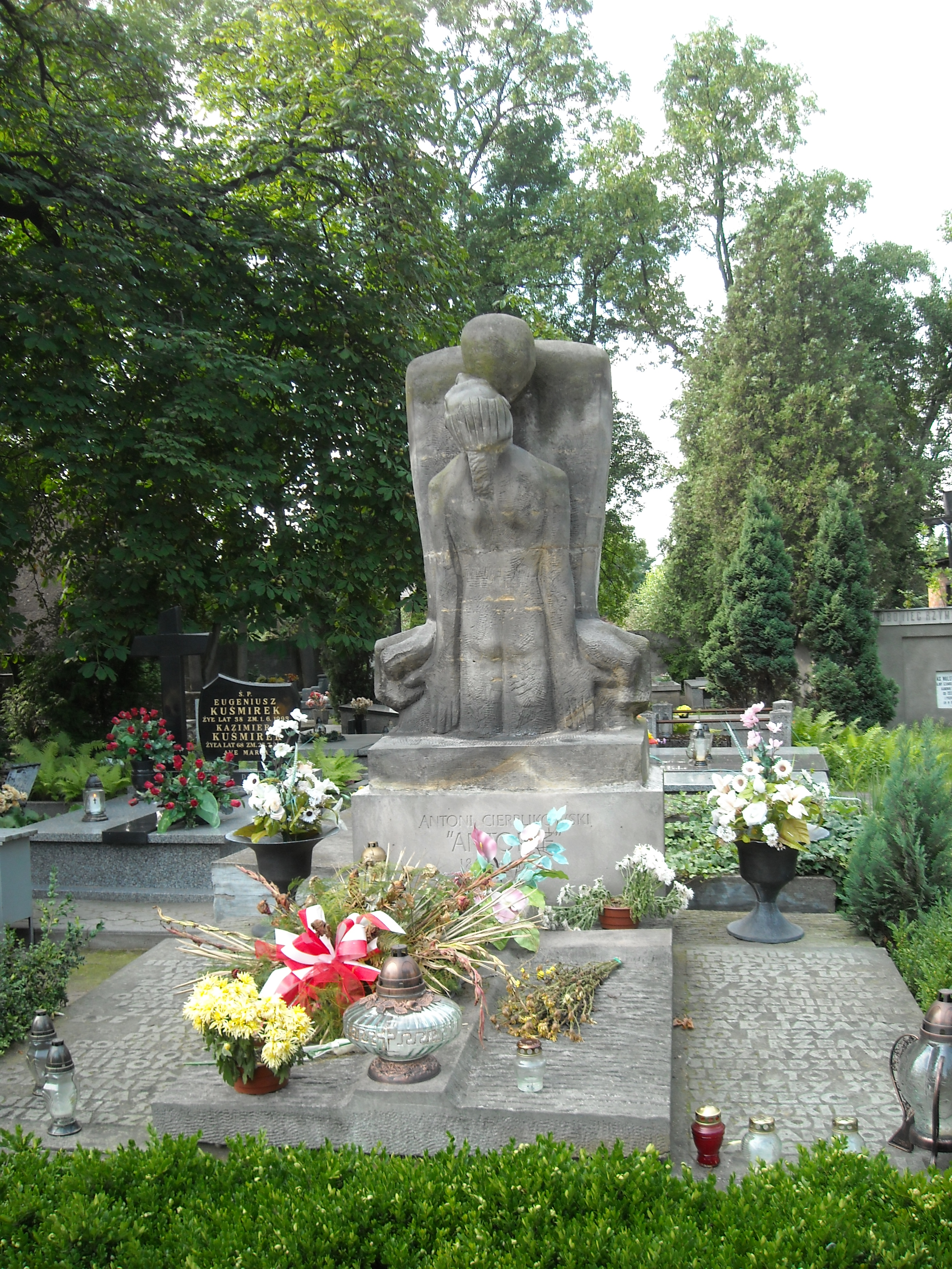 Pomnik na grobie Antoniego "Antoine" Cierplikowskiego